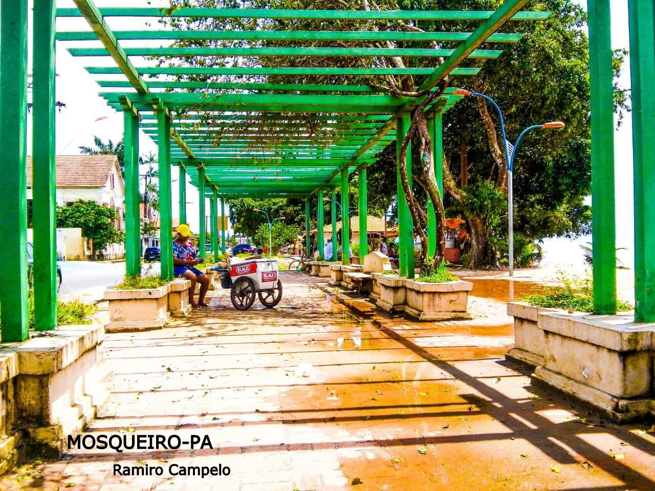 Mulher contando dinheiro